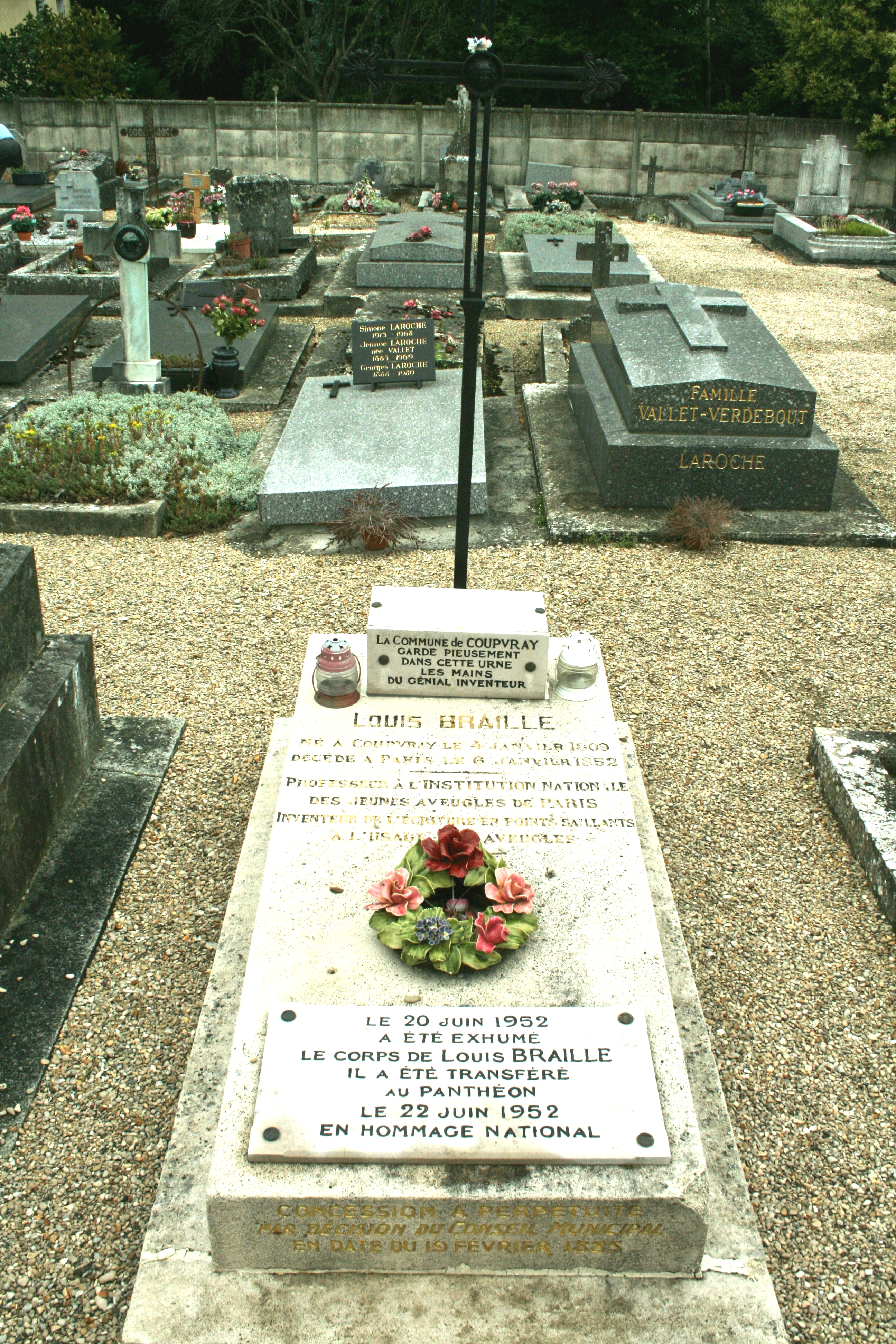 La tombe se trouve dans le vieux cimetière, dans la sixième rangée du milieu. Louis Braille, mort à l'Institut National des Jeunes Aveugles, à Paris, le 6 janvier 1852, fut inhumé en pleine terre le 10 janvier dans le petit cimetière de Coupvray où reposaient déjà son père et sa soeur Marie. C'est par une décision du conseil municipal en date du 15 février 1885, qu'il fut accordé une concession à perpétuité pour la tombe de Louis Braille. " Monsieur le Maire fait remarquer au conseil que Braille l'inventeur des procédés en relief pour l'instruction des aveugles a été inhumé dans les fosses communes. " " Le conseil municipal après avoir délibéré, considérant qu'il y a lieu de perpétuer le souvenir de ce grand homme décide à l'unanimité que le terrain où reposent ses restes mortels sera affecté uniquement à la sépulture de cet homme célèbre et qu'aucune autre inhumation ne pourra y être faite. " (archives communales). La commune y fit installer par un marbrier de Lagny, une pierre tombale et une croix de fer ayant dans son centre une tête de femme en pleurs. Sur la tombe, le maire fit graver : LOUIS BRAILLE né à Coupvray le 4 janvier 1809 décédé à Paris le 6 janvier 1852 PROFESSEUR A L'INSTITUT NATIONAL DES JEUNES AVEUGLES DE PARIS INVENTEUR DE LECRITURE EN POINTS SAILLANTS A L'USAGE DES AVEUGLES Cent ans plus tard, le 18 décembre 1952, un projet de loi fut établi, demandant le transfert des cendres de Louis Braille au Panthéon. Le 18 juin 1952, le corps fut exhumé. Il ne restait rien du cercueil, que le squelette. A la demande du conseil, " une relique devait rester à Coupvray ". Et en effet, ce qu'il y avait de plus précieux resta sur la tombe, dans une petite urne, les mains. On peut y lire : LA COMMUNE DE COUPVRAY GARDE PIEUSEMENT DANS CETTE URNE LES MAINS DU GENIAL INVENTEUR Une autre plaque y fut apposée par l'état, sur laquelle est écrit : LE 20 JUIN 1952 A ETE EXHUME LE CORPS DE LOUIS BRAILLE. IL A ETE TRANSFERE AU PANTHEON LE 22 JUIN 1952 EN HOMMAGE NATIONAL